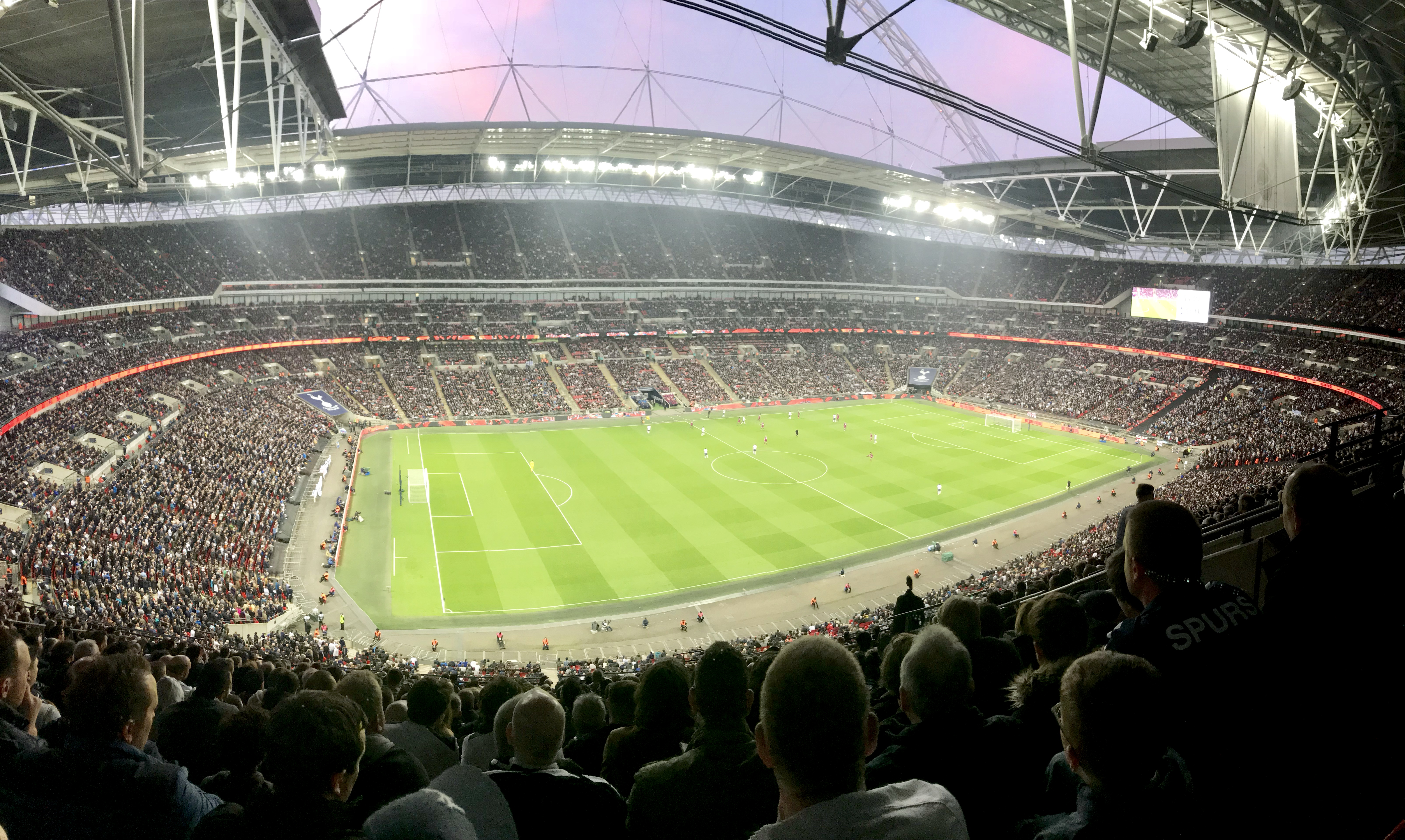 Wembley Stadium, Wembley, Iso-Britannia, huhtikuuta 2018